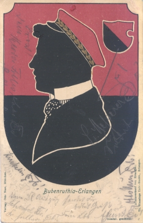 Couleurkarte der Bubenruthia von 1903